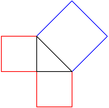 Пифагоровы штаны